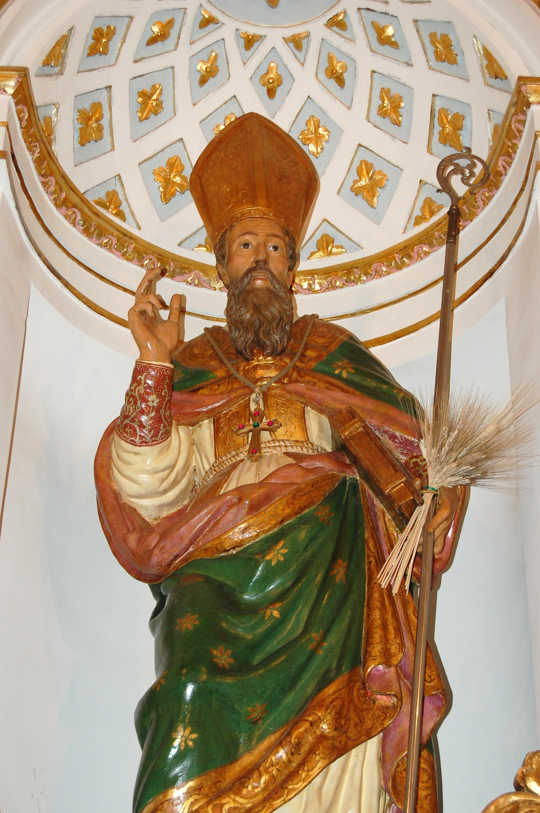 San Cataldo, Chiesa Madre: la statua di San Cataldo Vescovo conservata nella chiesa.